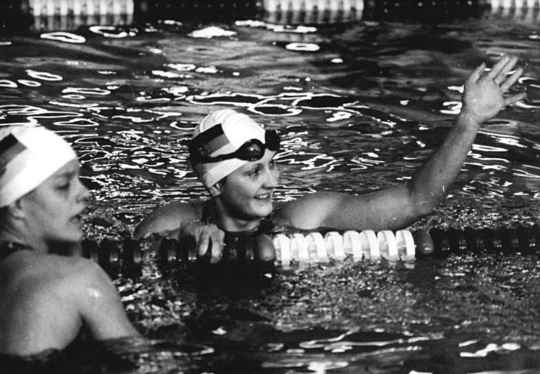 Ines Geißler ADN-ZB Ludwig-29.5.82 Erfurt: DDR-Meisterschaften im Schwimmen- Mit einer Zeit von 1:00,61 erkämpfte sich Ines Geißler (SC Karl-Marx-Stadt) in der Disziplin 100mm Schmetterling den DDR-Meistertitel.